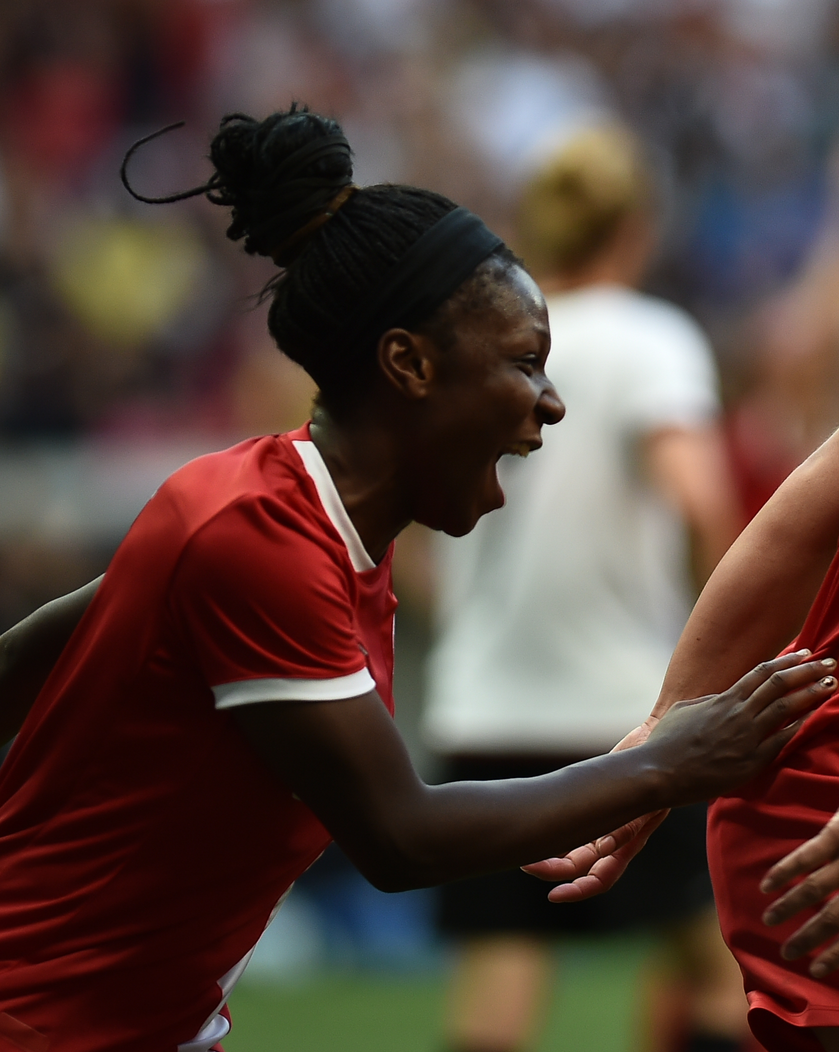 Estádio Nacional de Brasília Mané Garrincha, Brasília, DF, Brasil, 9/8/2016 Foto: Andre Borges/Agência Brasília Alemanha e Canadá jogam nesta terça-feira (9), no Estádio Mané Garrincha, pelo grupo F do futebol feminino nas Olimpíadas 2016.